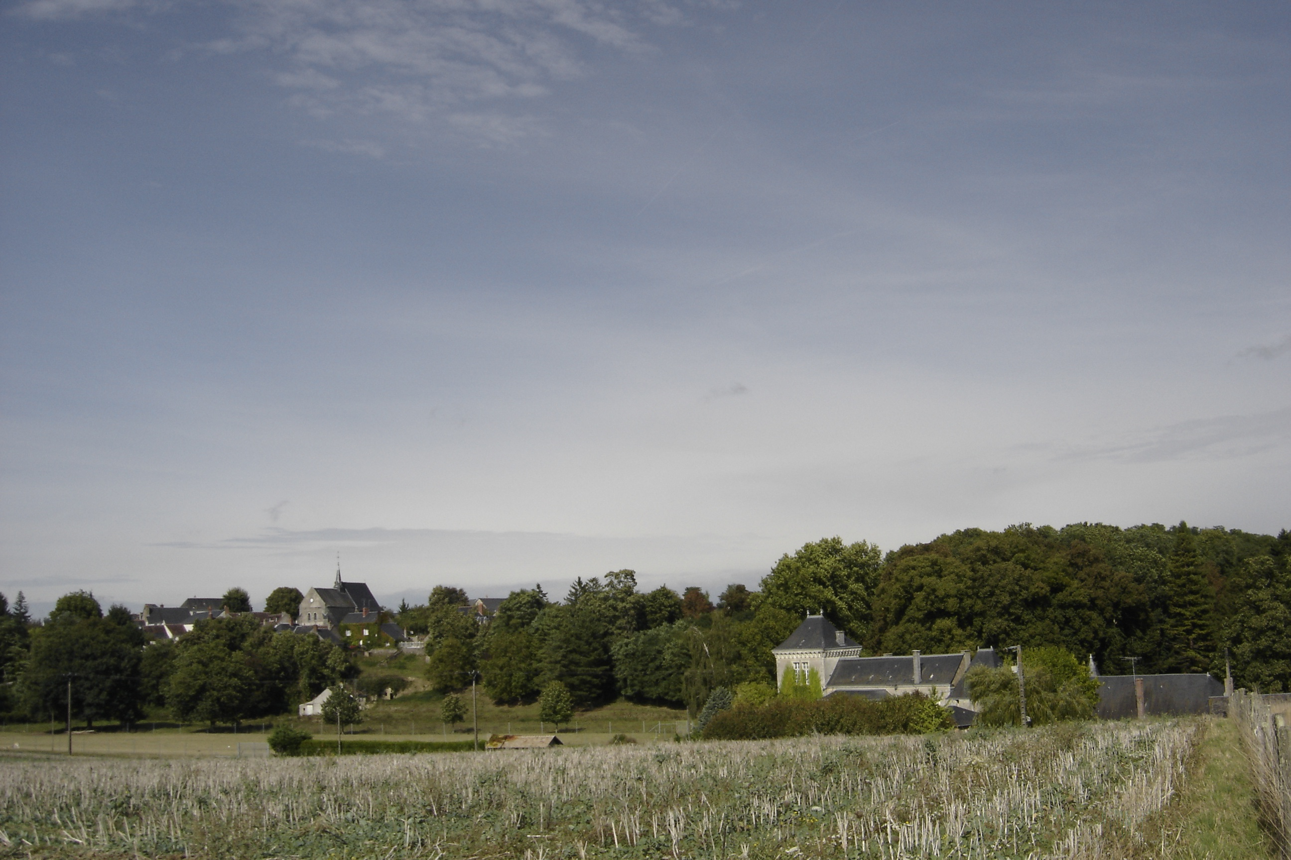 Le Bourg de Cerelles et le château de la Bédouère (F37)